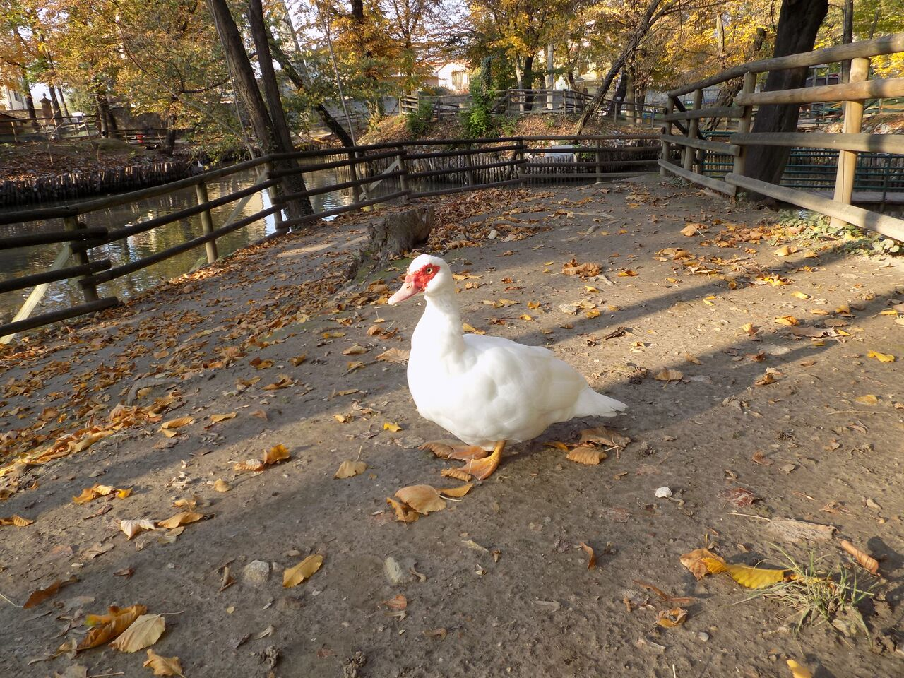 Anatra Parco Buzzaccarini Monselice